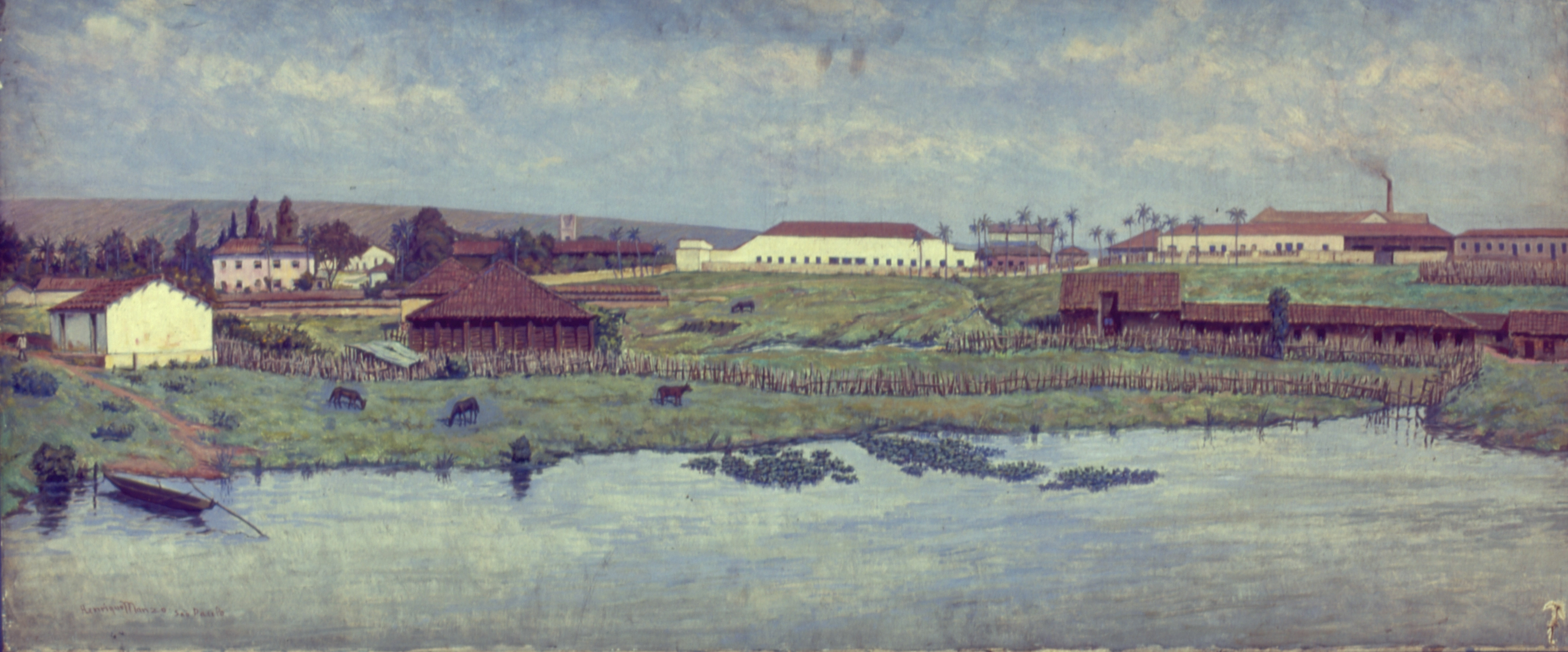 Obra que integra o acervo do Museu Paulista da USP. Coleção Fundo Museu Paulista - FMP